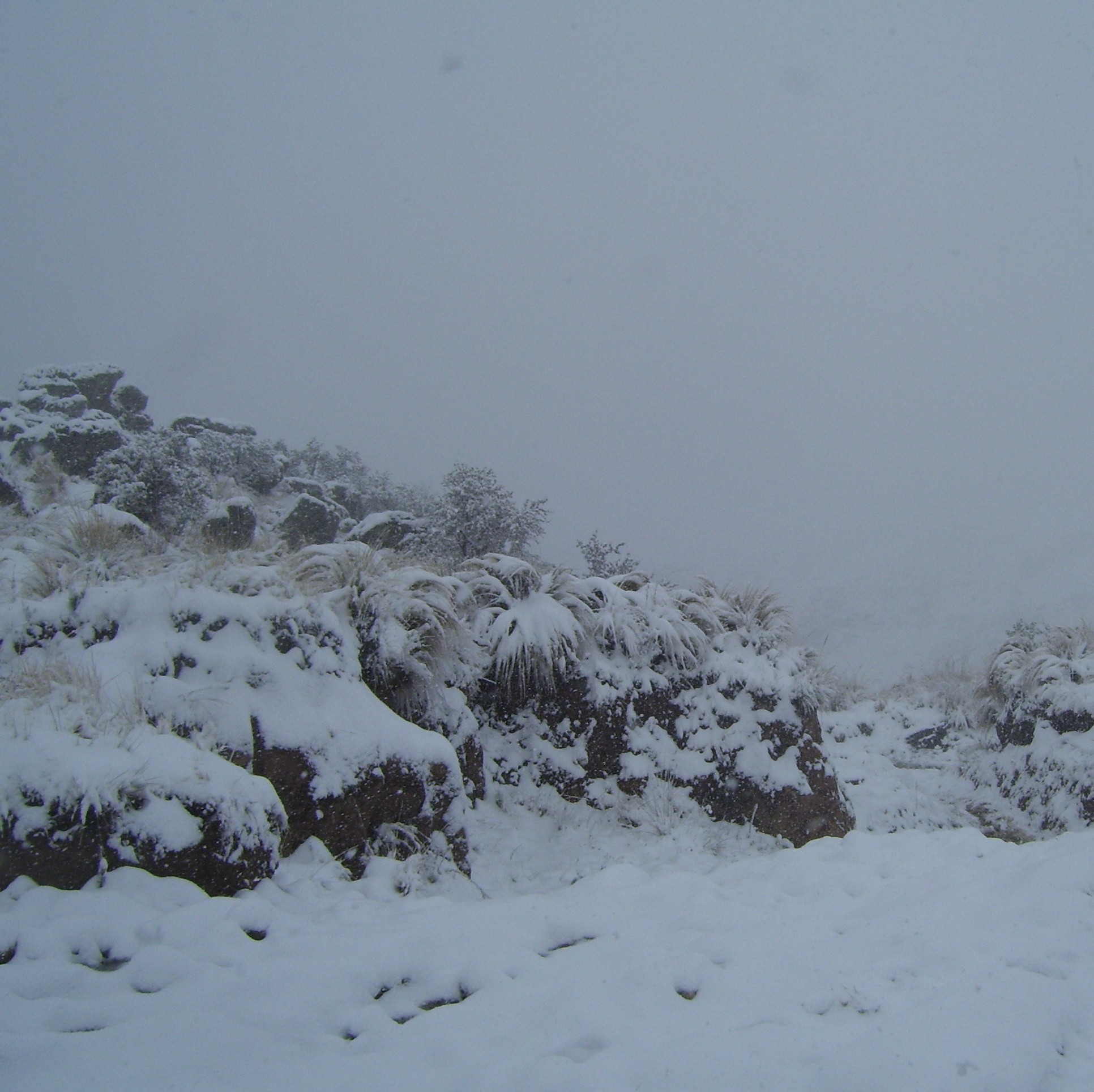 foto tomada en el cerro champaqui de la cara oeste